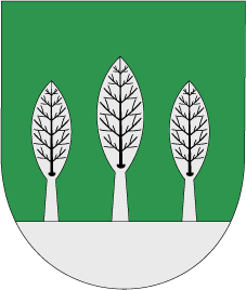 герб містечка Воловець австрійського періоду